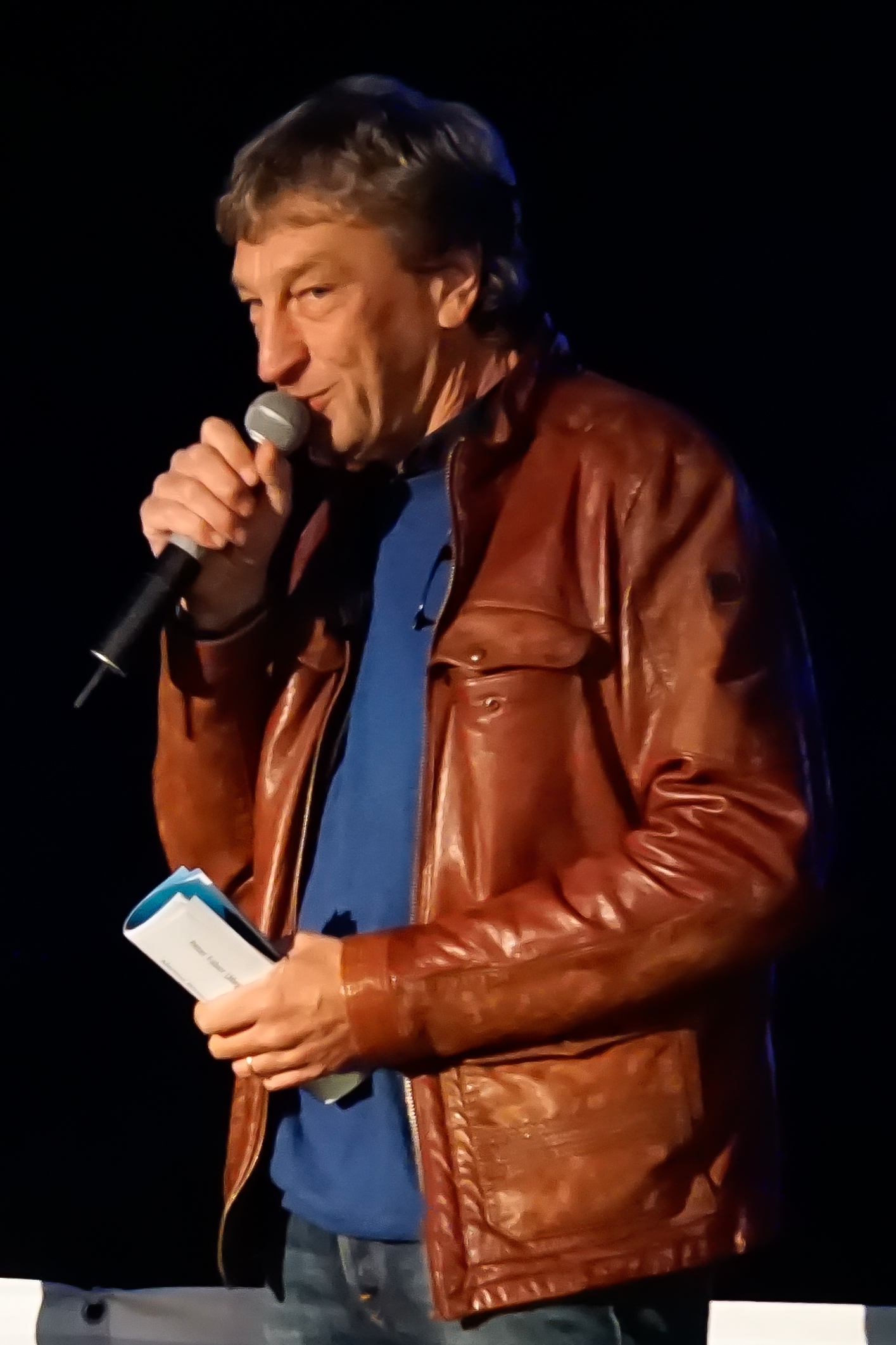 Tatort-Dortmund, Vorpremiere für die Folge 9 "Zahltag" beim Openairkino im Westfalenpark: Matthias Bongard (WDR-Moderator)